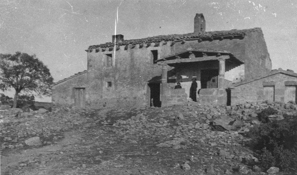 Sant Maria Saserra o de Vallferrosa a Torà. Cèsar August Torras i Ferreri (Entre 1890 i 1923)